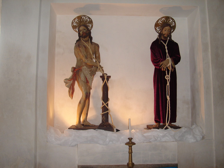 Museu de Arte Sacra de Rio Pardo, no Rio Grande do Sul